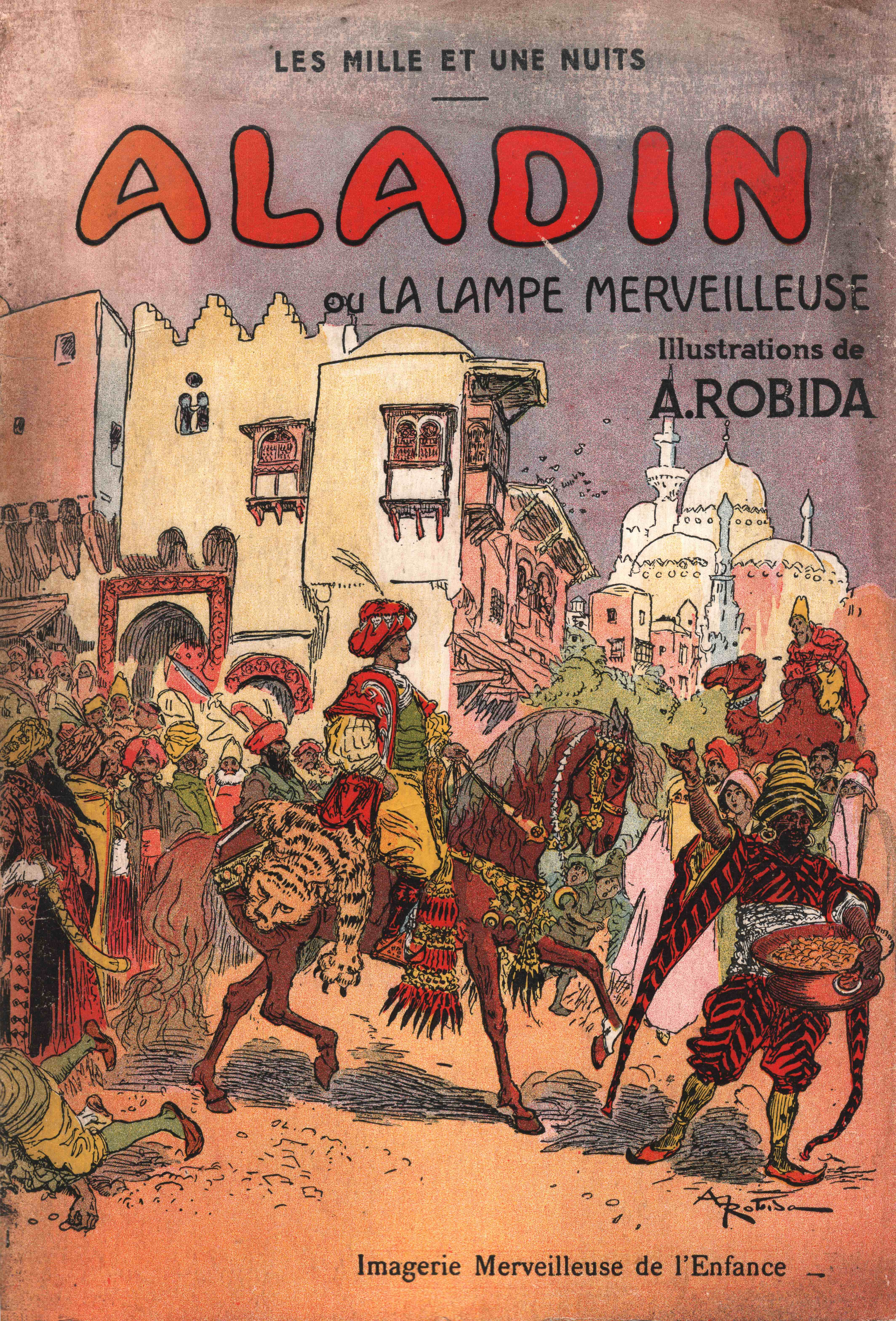 Aladin - illustré par Albert Robida - Paris - Imagerie merveilleuse de l'Enfance - page de couverture